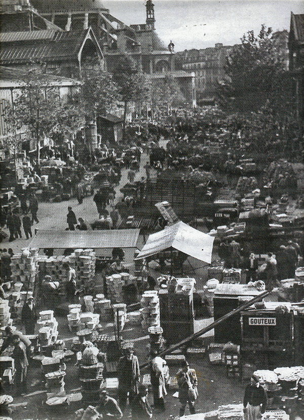 Le marché des Halles de Paris avant son transfert vers Rungis, au début des années 70. On distingue à l'arrière plan l'église Saint Eustache. Photo d'André Gouteux.